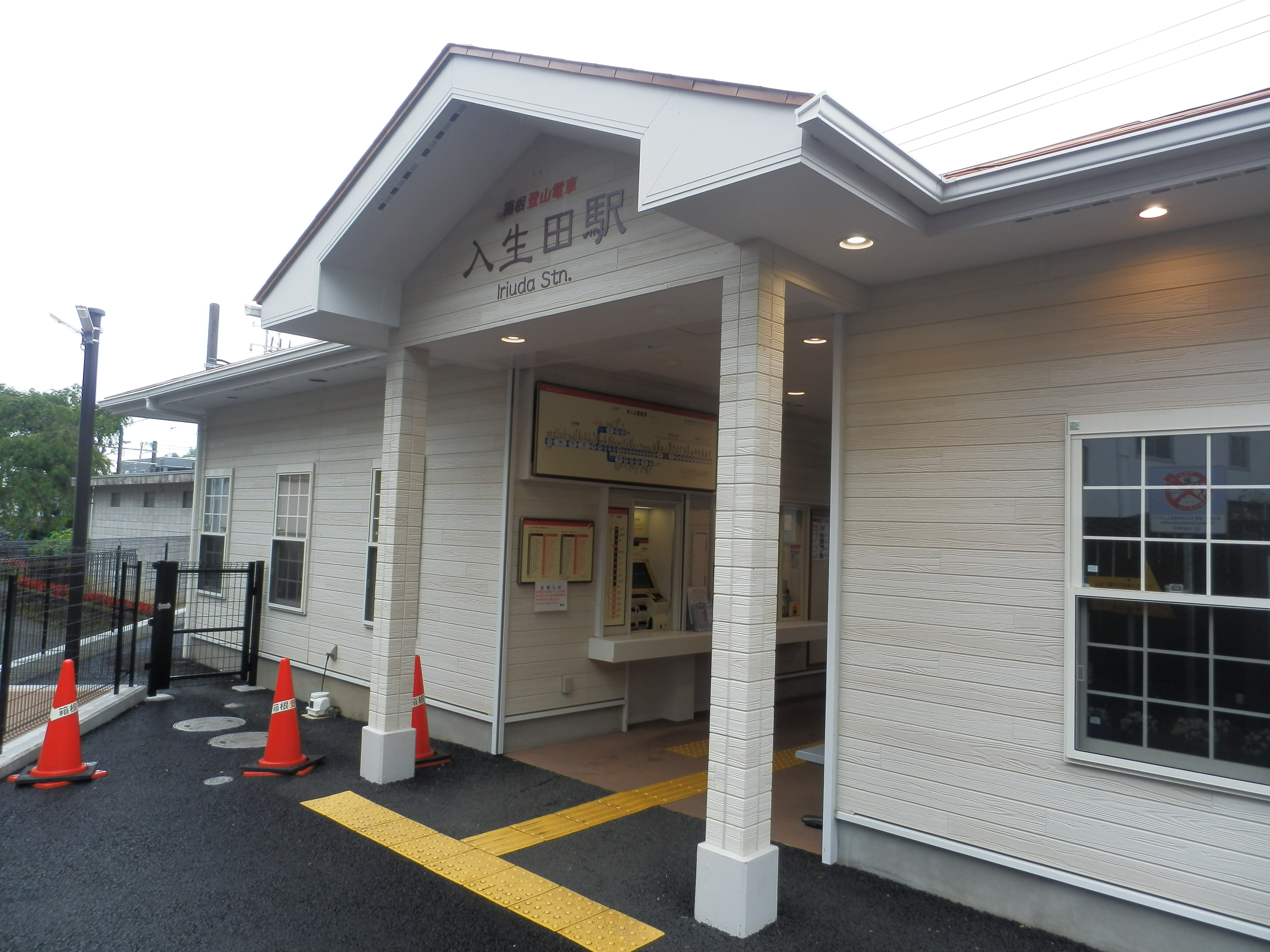 入生田駅駅舎